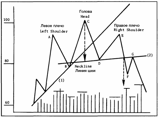 "Голова и плечи" (сверху) и объем (снизу)